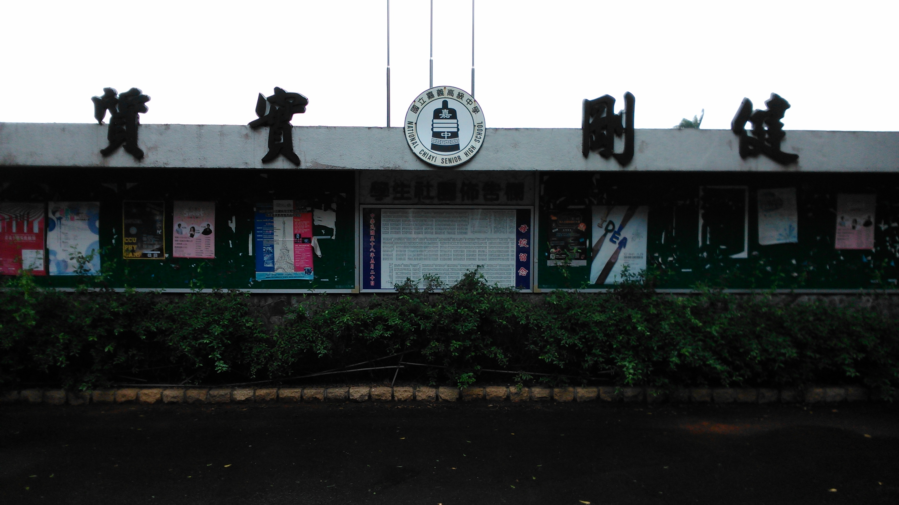 嘉中の校訓